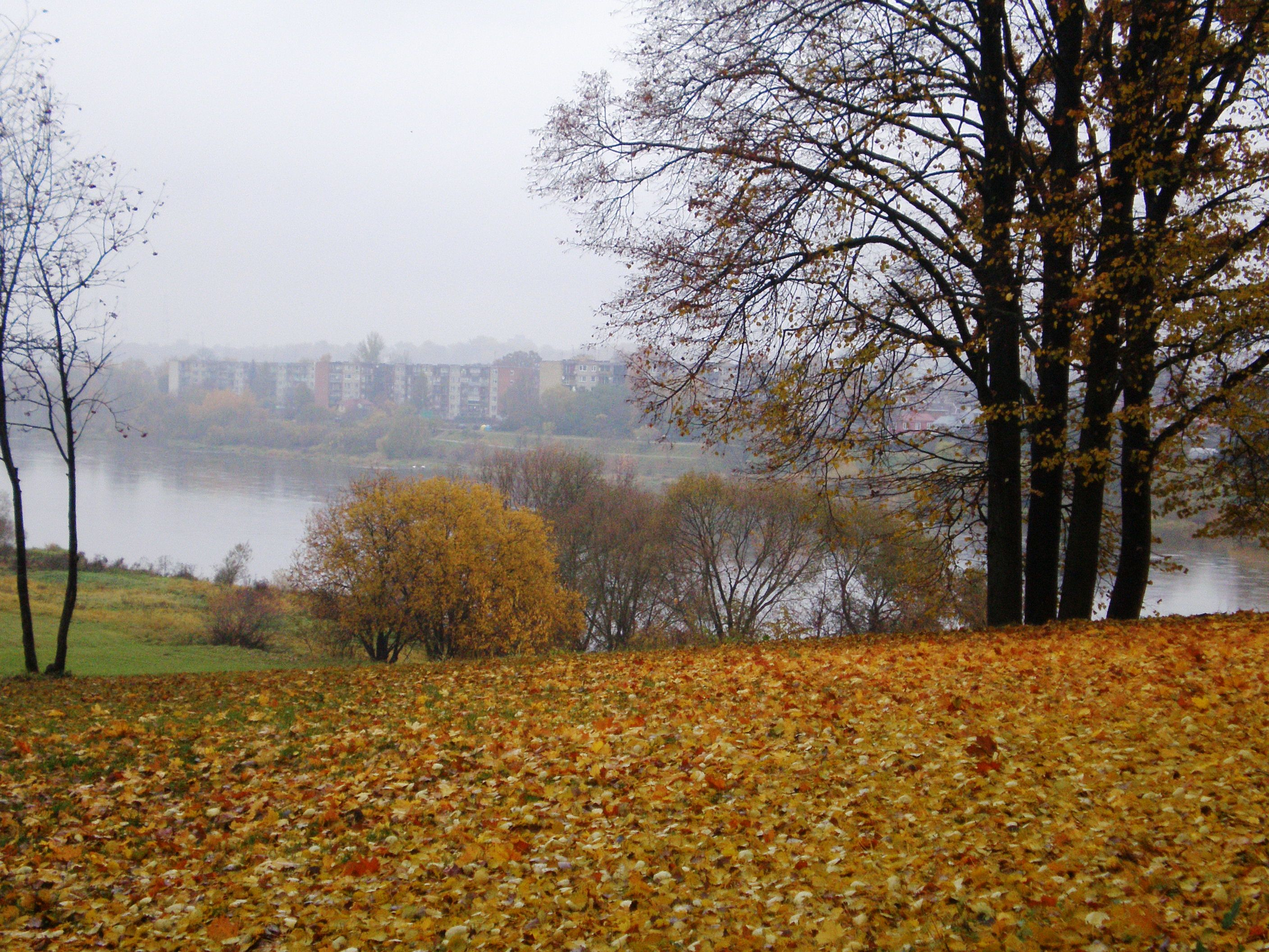 Napoleono kalnas. Kaunas